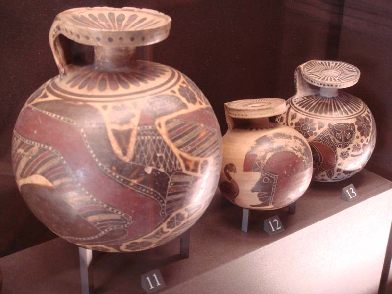 Ces aryballes sont visibles dans les salles de la collection Campana au Louvre, Paris